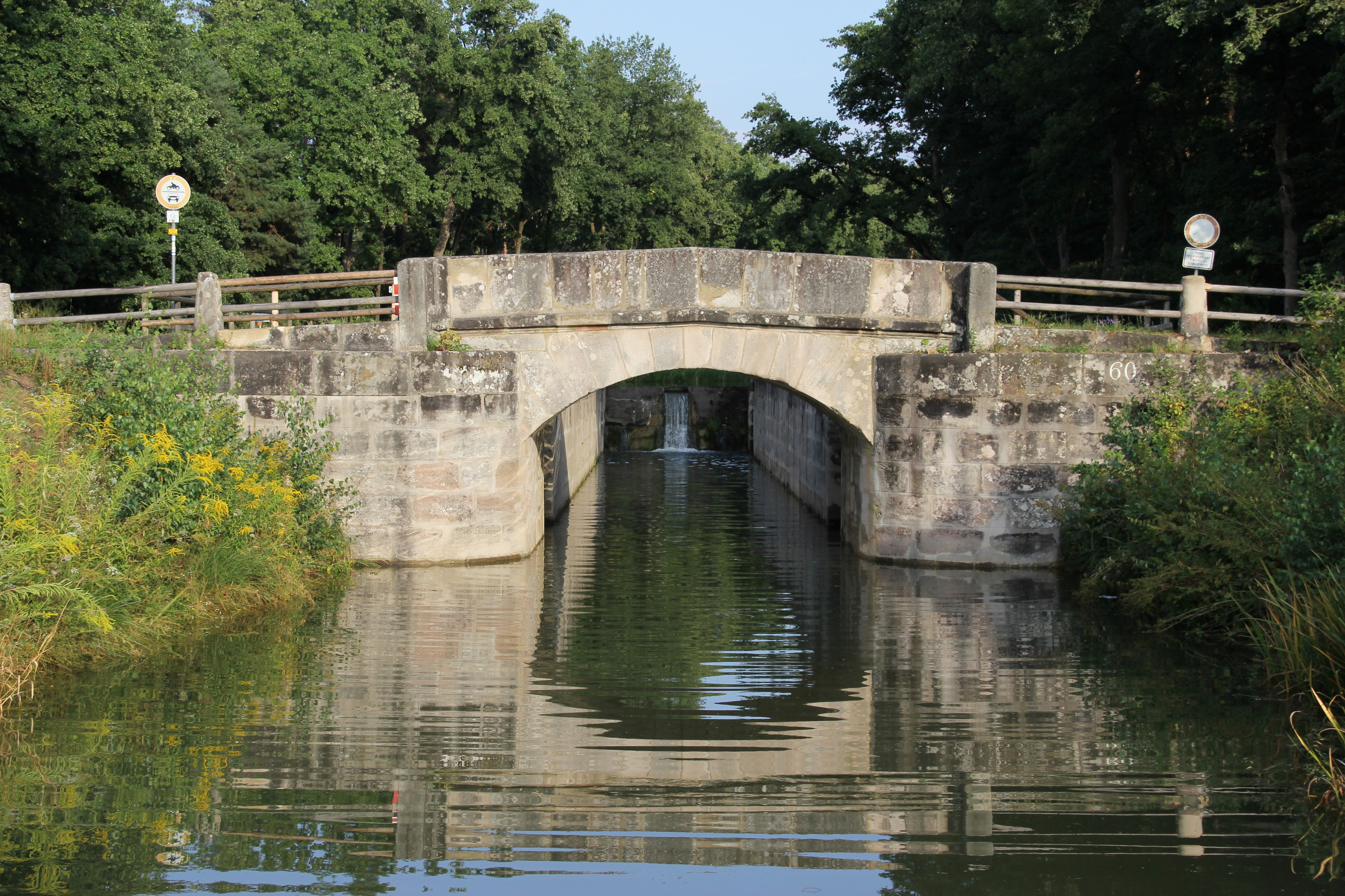 Ludwig-Donau-Main-Kanal, Schleuse 60